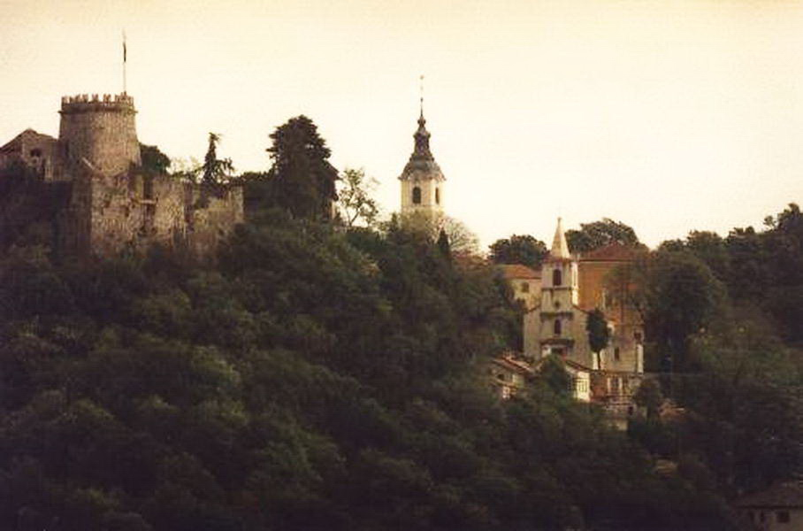 Rijeka - Trsat